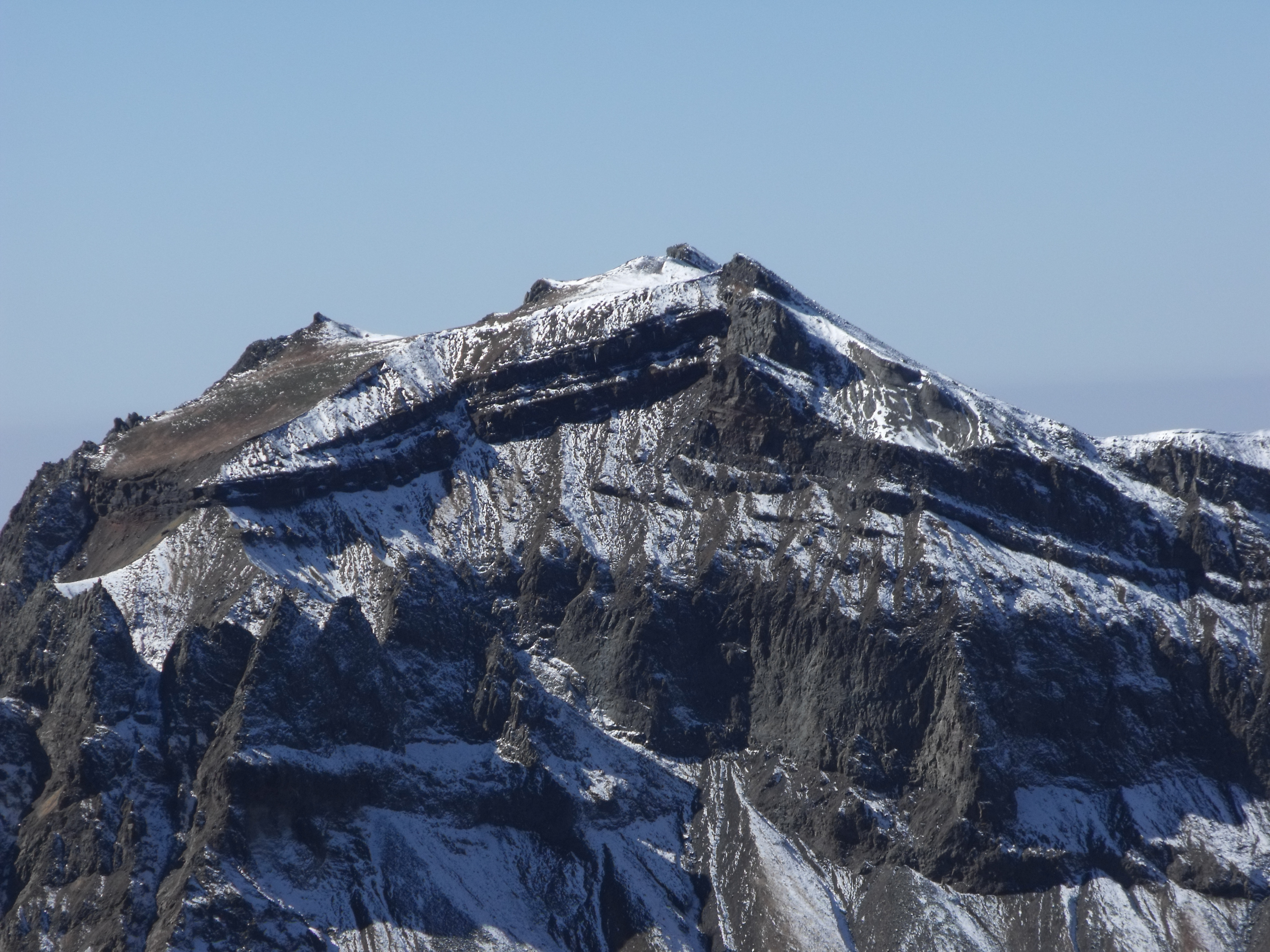 长白山天池主峰